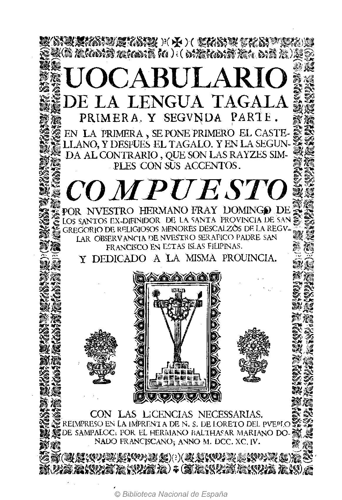 Vocabulario de la lengua tagala : Primera y segunda parte. En la primera, se pone primero el castellano, y despues el tagalo. Y en la segunda al contrario, que son las rayzes simples con sus accentos Compuesto por... Fray Domingo de los Santos... Autor: Domingo de los Santos (O.P.) (m. 1695) Fecha: 1794 Datos de edición: Sampaloc Reimpreso en la Imprenta. de N.S. de Loreto del pueblo de Sampaloc: por el Hermano Balthasar Mariano ...